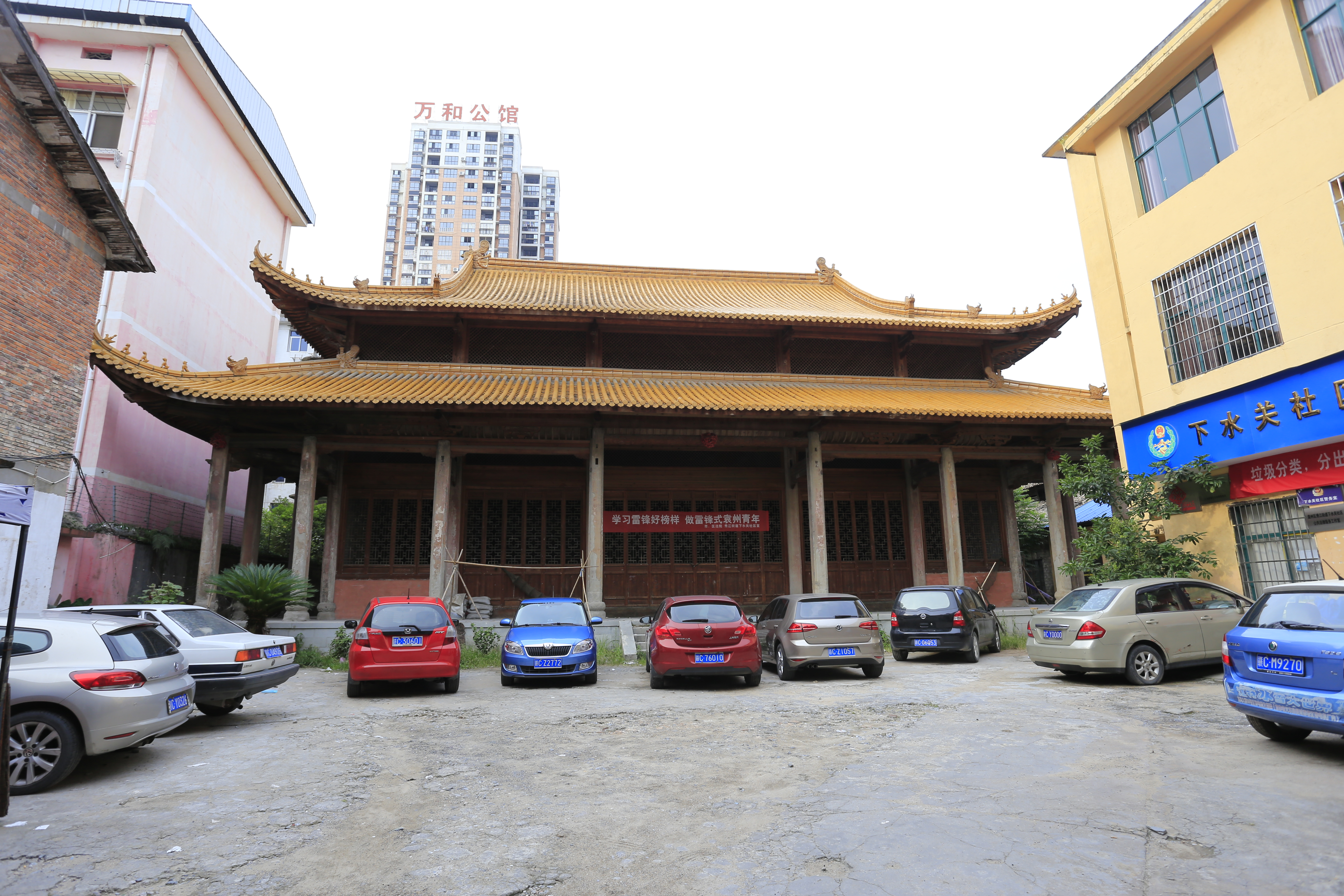 宜春文庙大成殿